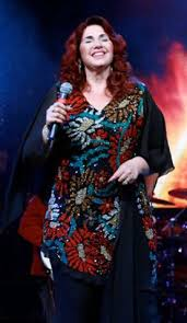 Liliani na gravação do DVD Chuva De Sangue do conjunto Voz da Verdade.